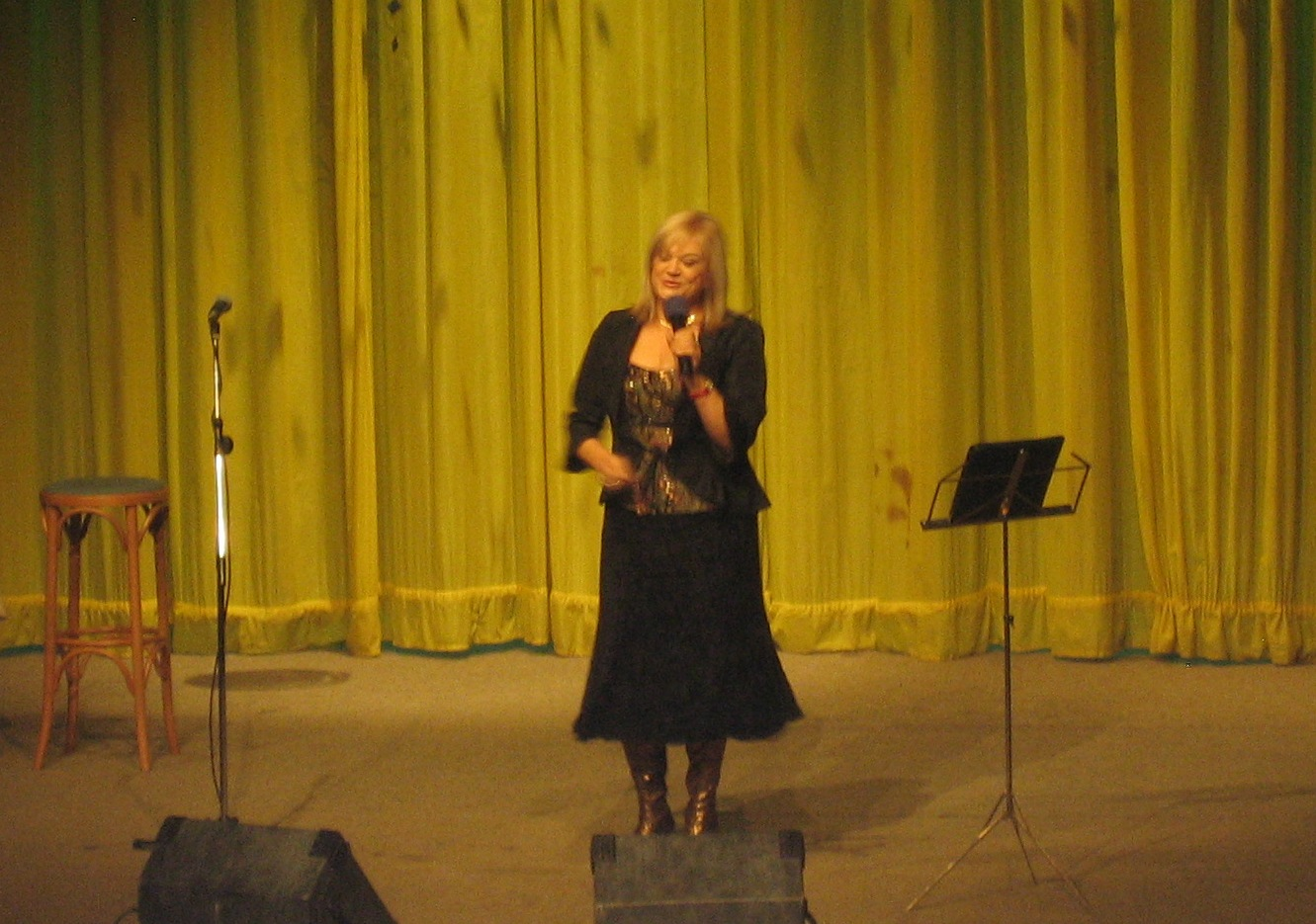 Marcela Laiferová at her concert